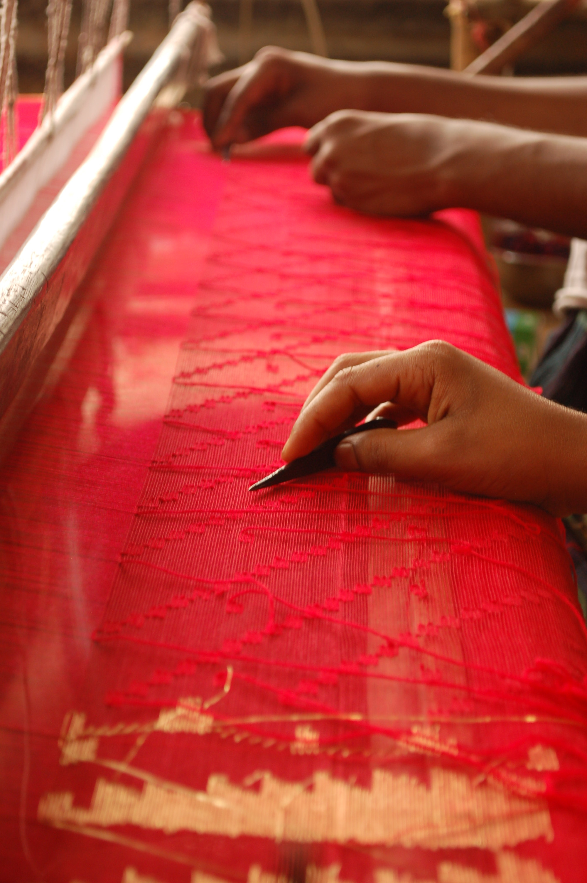 ফুটিয়ে তোলা হচ্ছে অপরূপ নকশা...